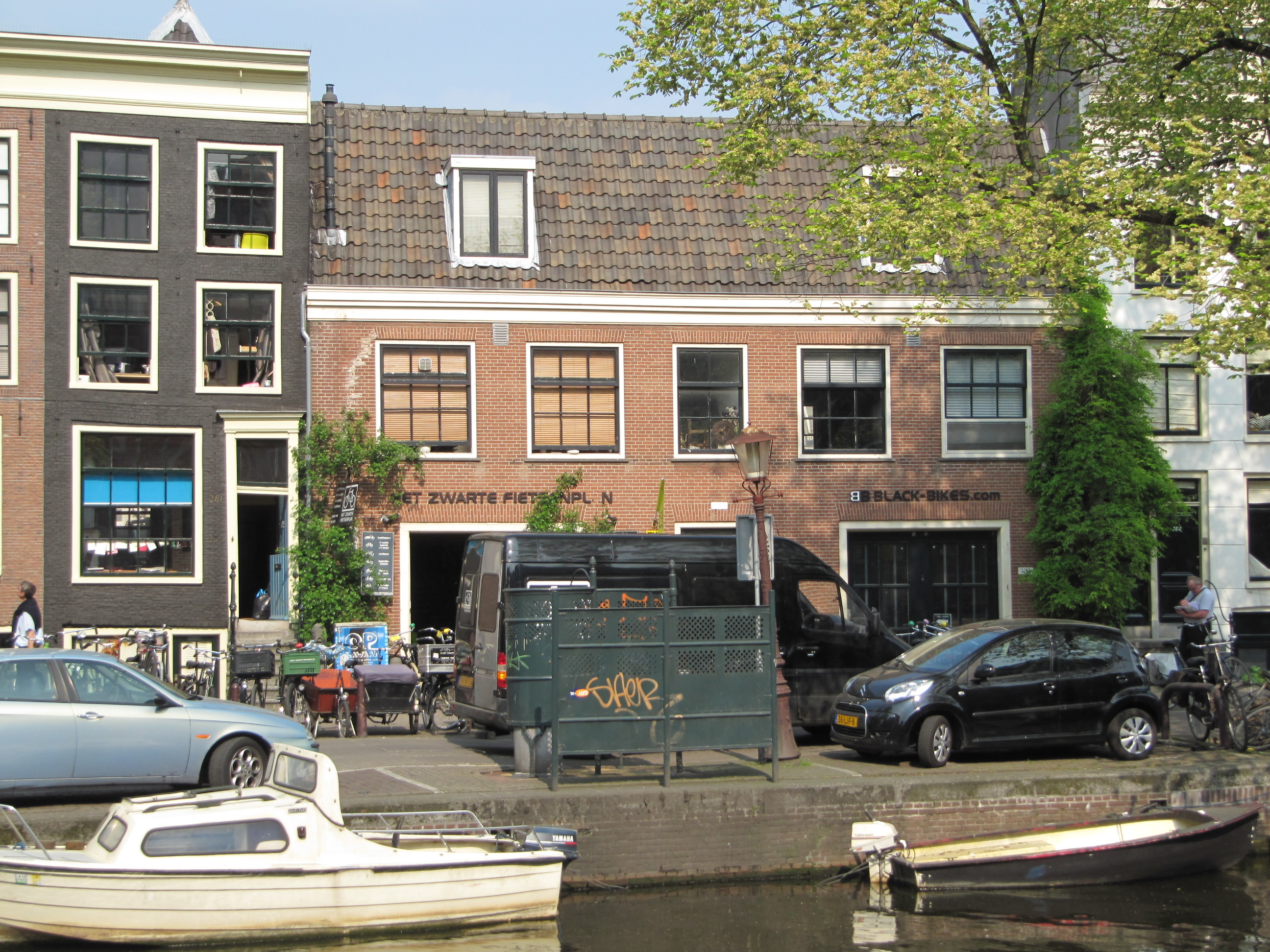 RM3647 Amsterdam - Lijnbaansgracht 282.jpg